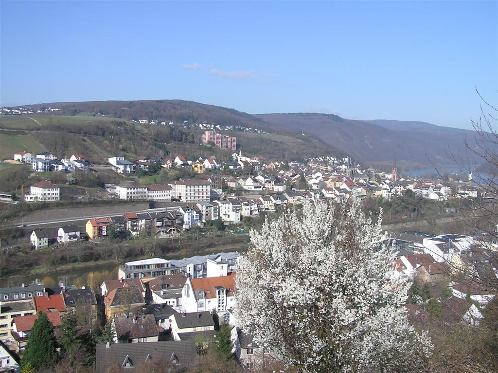 Bingerbrück am 11.3.2007 vom Scharlachkopf aus gesehen.